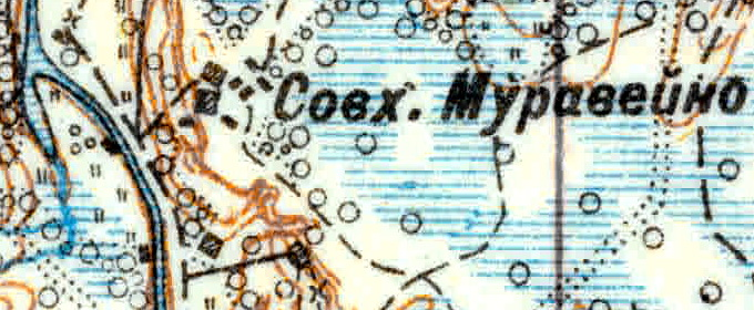 Топографическая карта Ленинградской области, квадрат VIc (Красные Горы), деревня Муравейно